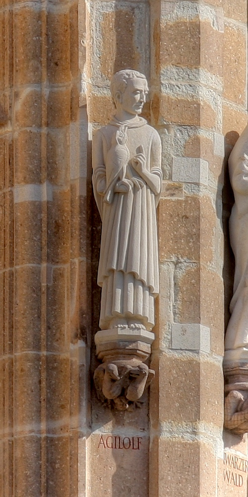 Rathausturm Köln mit der Figur des Agilolf von Köln Details zu der Statue: Bildhauer der Agilolf-Statue: Elisabeth Baumeister-Bühler Details zu der Konsole: Thema der Konsole unter der Agilolf-Statue: „Zwei Krähen“. Bildhauer: Herbert Rausch